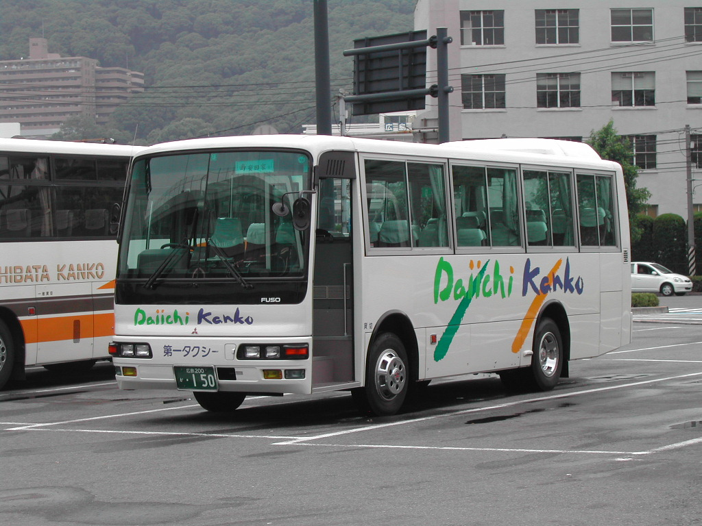 広島駅新幹線口にて